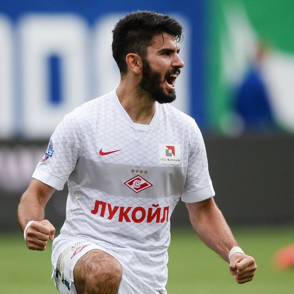 Игрок "Спартака" Сердар Таски в матче 4-го тура чемпионата России по футболу среди клубов Премьер-лиги между ПФК ЦСКА (Москва) и ФК "Спартак" (Москва)